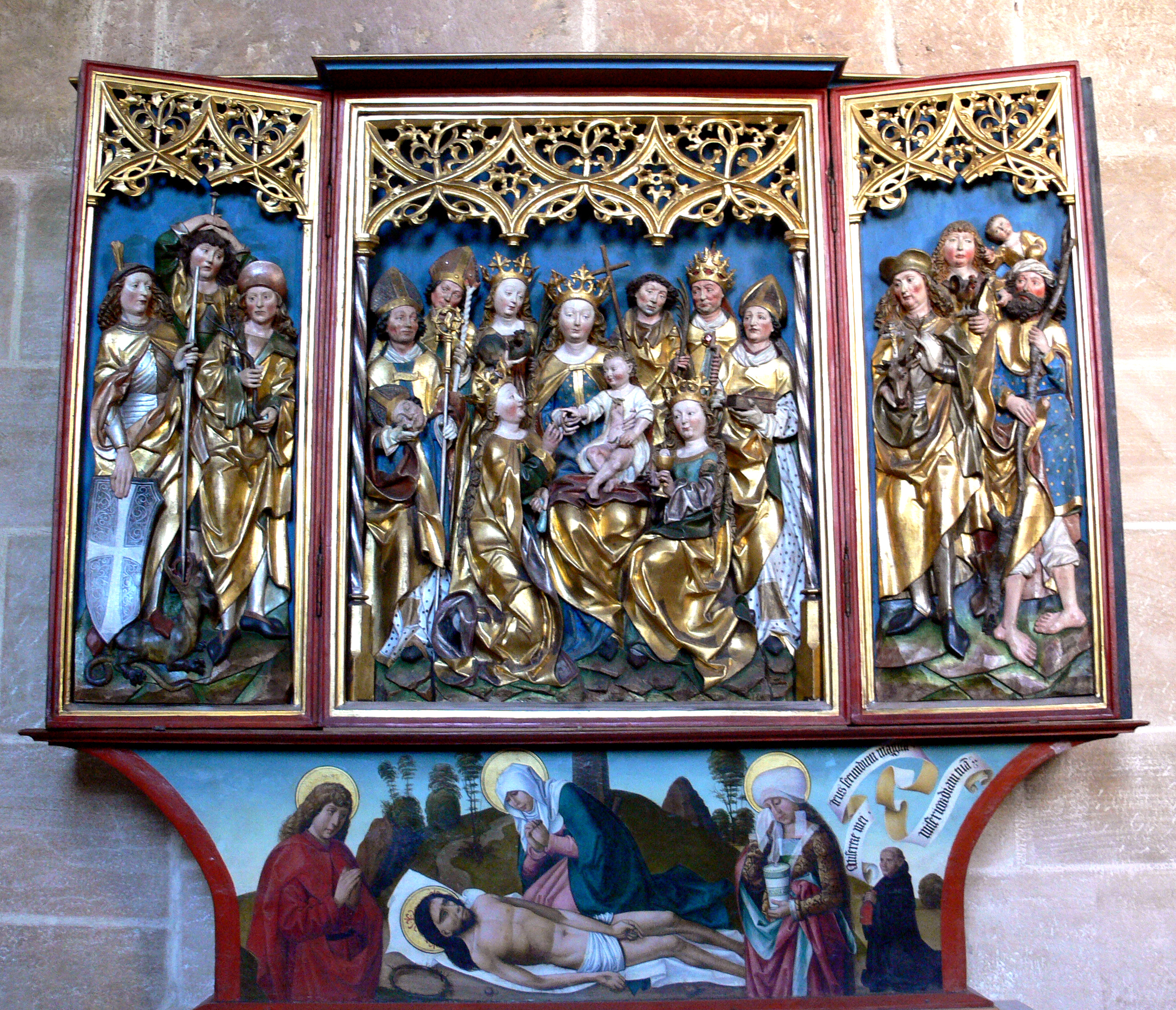 Heilsbronn, Landkreis Ansbach, Münster St. Marien und Jakobus Vierzehn-Nothelfer-Altar von 1498